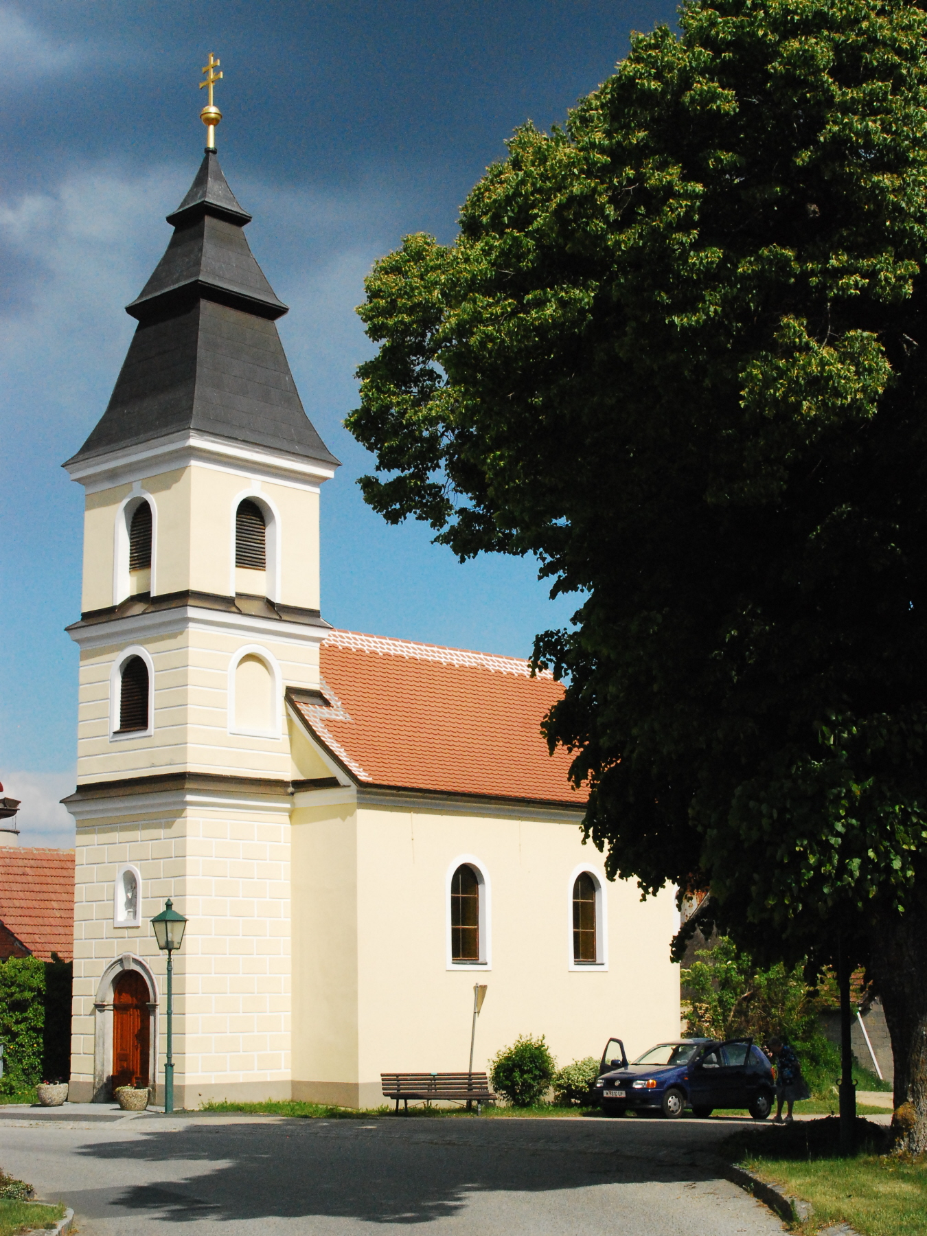 Ortskapelle von Untermixnitz in Niederösterreich